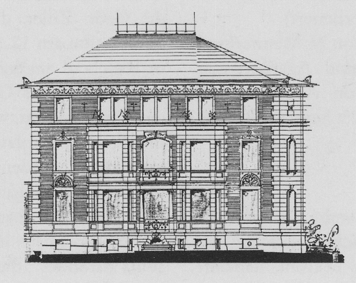 Radebeul Villa Viktoria Bauzeichnung 1889